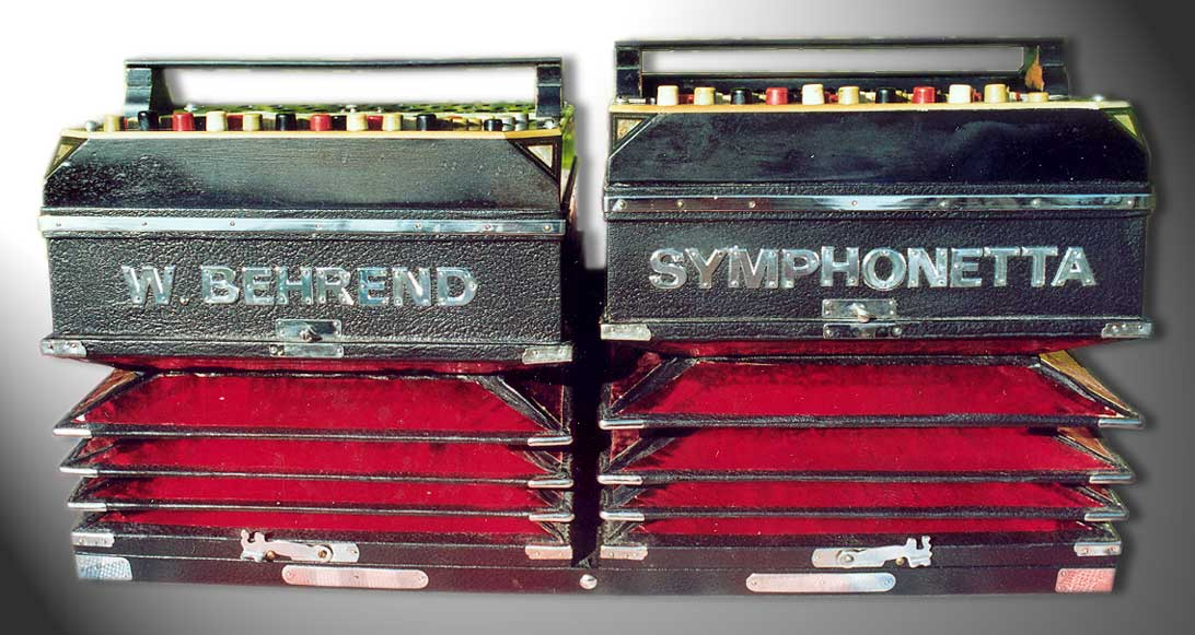 Symphonetta